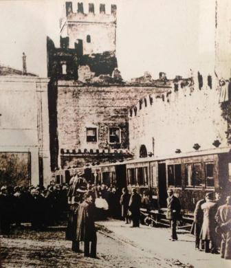 Schiavon, inagurazione della tranvia Vicenza-Bassano.